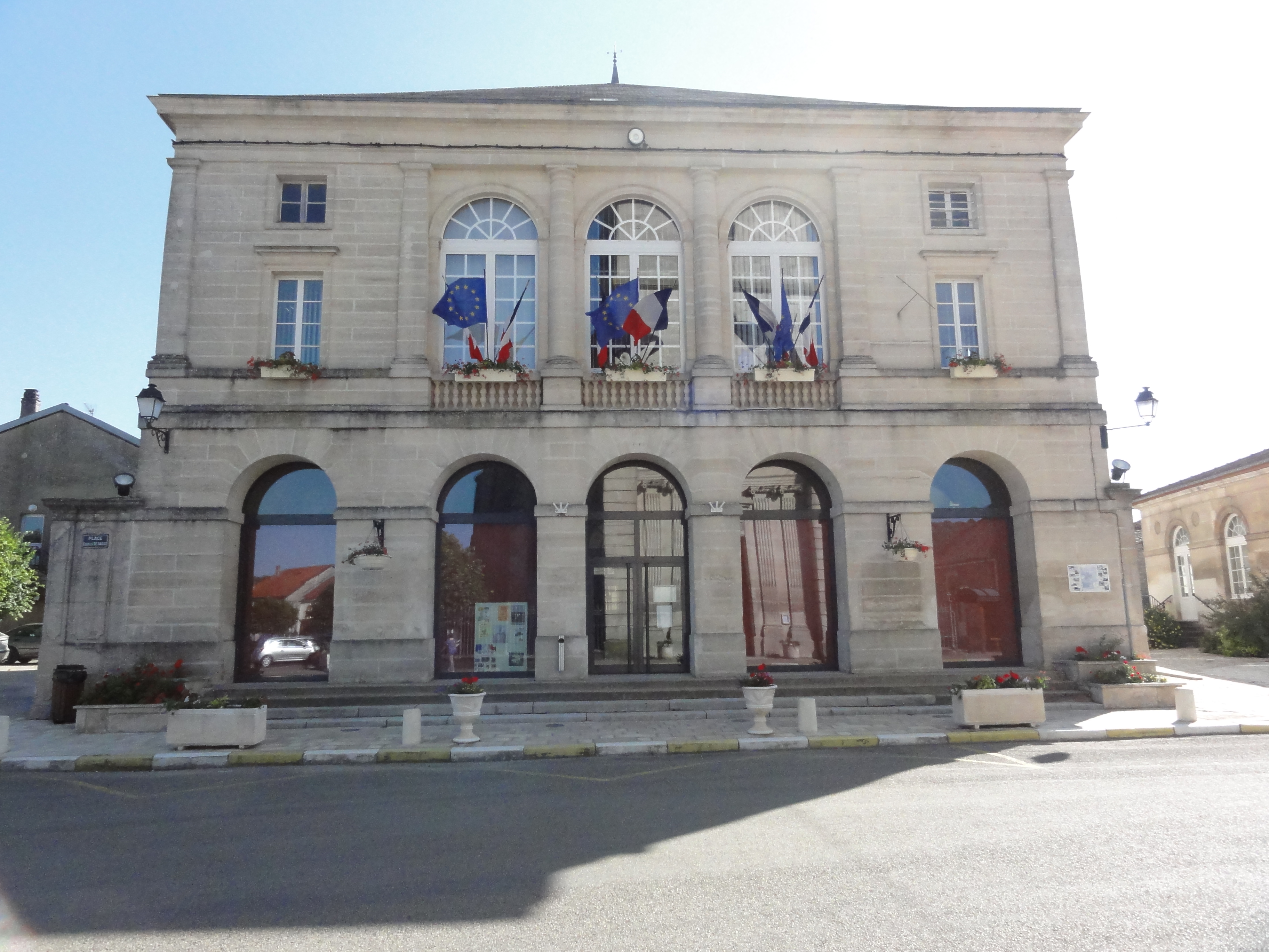 Doulaincourt, la mairie